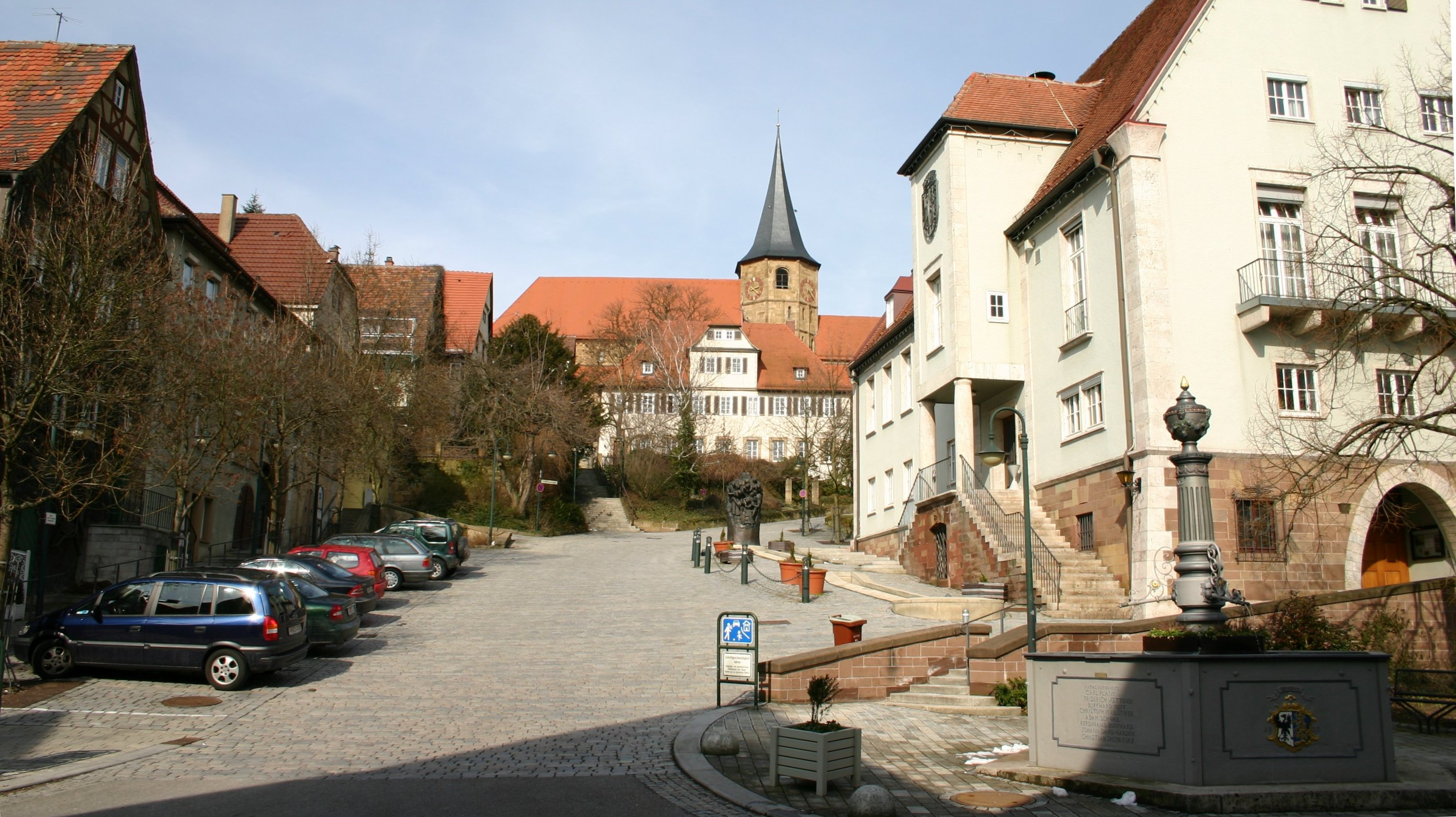 Weinsberger Marktplatz